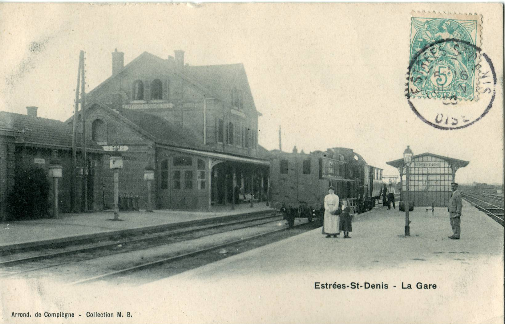 Carte postale ancienne éditée par MB : Arrondissement de Compiègne - Estrées-Saint-Denis (Oise - Picardie - France) - La gareLa rame au premier plan est un "train-tramway" de la Compagnie du nord, tractée par une automotrice à vapeur série VV1 à 2 construite par les ateliers de la compagnie en 1901. Elle est placée au centre de la rame pour permettre la marche dans les deux sens. Les compartiments voyageurs sont désaxés par rapport au châssis afin de garantir au mécanicien la visibilité de la voie. Dans la partie basse, les voitures comportent des coffres à bagages.